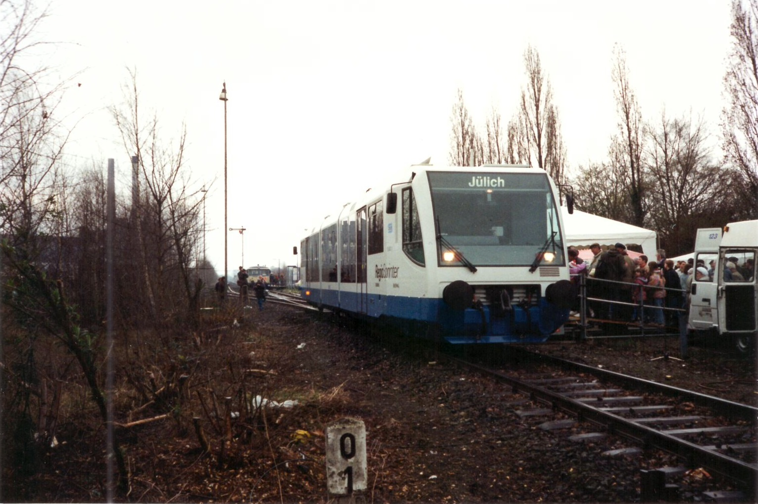 Unter reger Beteiligung von Politik und Medien wurde am 25. März in Jülich und am 26. März 1995 in Düren das erste Fahrzeug der neuen Generation der Öffentlichkeit vorgestellt. Die Lebensdauer dieser bewusst preiswert konstruierten Schienenfahrzeuge wurde damals mit etwa 20 Jahren angegeben. Im Hintergrund ist im Planbetrieb am provisorischen Holzbahnsteig einer der zahlreichen Schienenbusse zu sehen, welche die Dürener Kreisbahn 1993 als Übergangslösung von der Deutschen Bundesbahn erworben hatte, wo sie in den 1950er-Jahren als Baureihe VT 98 beschafft worden waren.